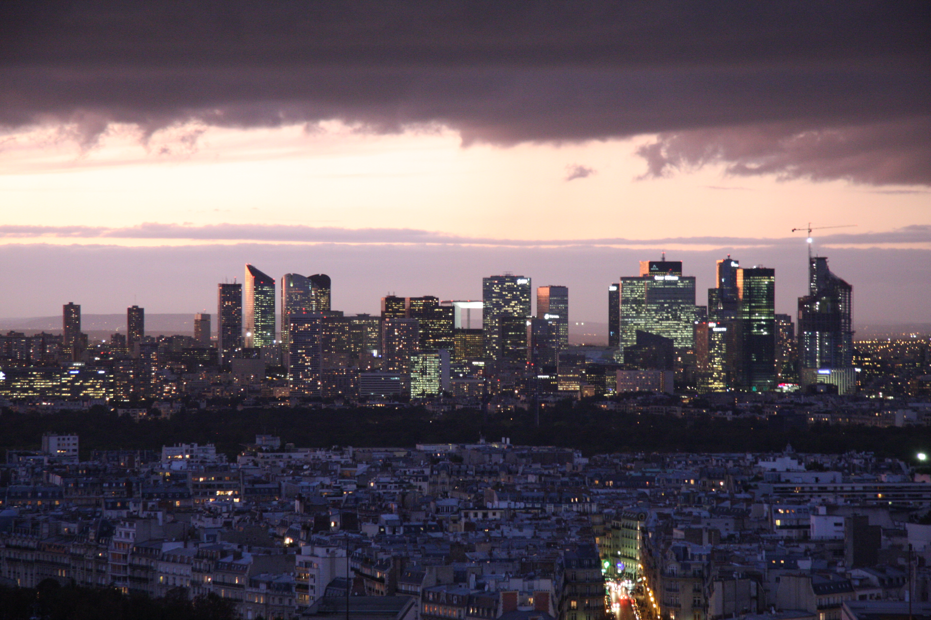 Octubre 2009